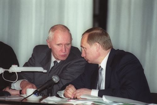 Евгений Адамов, министр атомной энергетики России